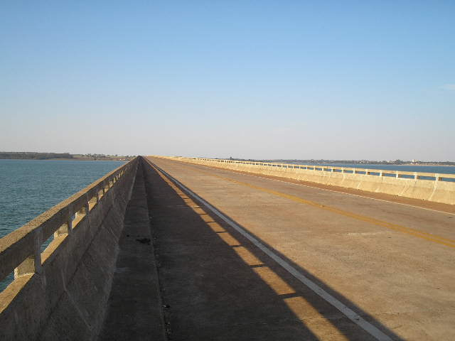 Ponte Novo Oriente sobre o Rio tietê.